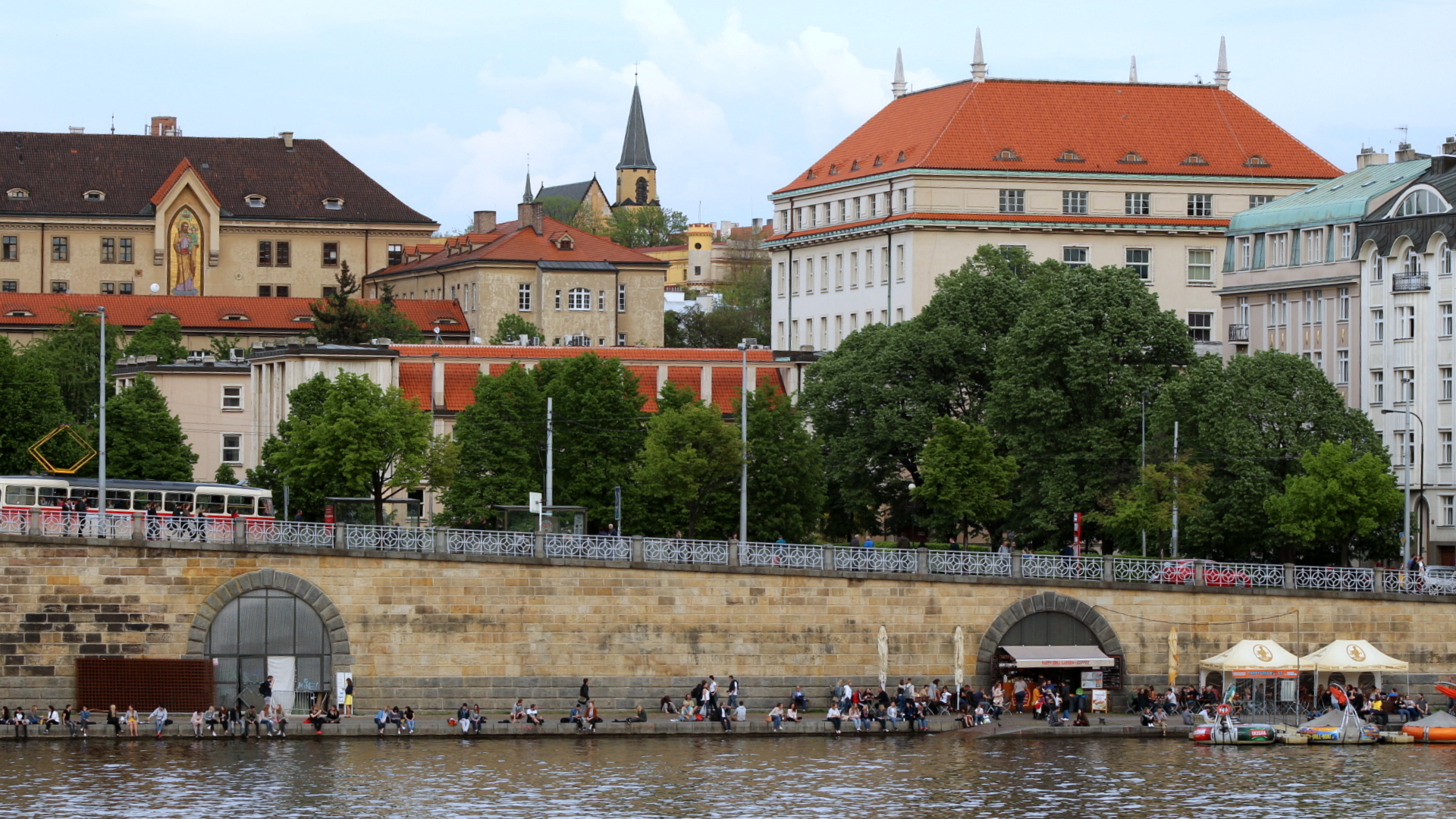 Část Emauzského kláštera, věž kostela sv. Apolináře a budova Ministerstva práce a sociálních věcí od Vltavy